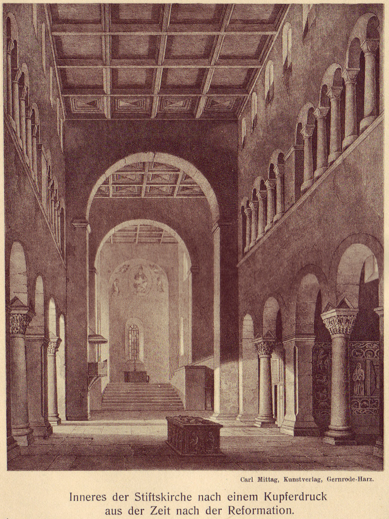 Darstellung der Stiftskirche Gernrode um 1700; im rechten Seitenschiff vorn das Heilige Grab